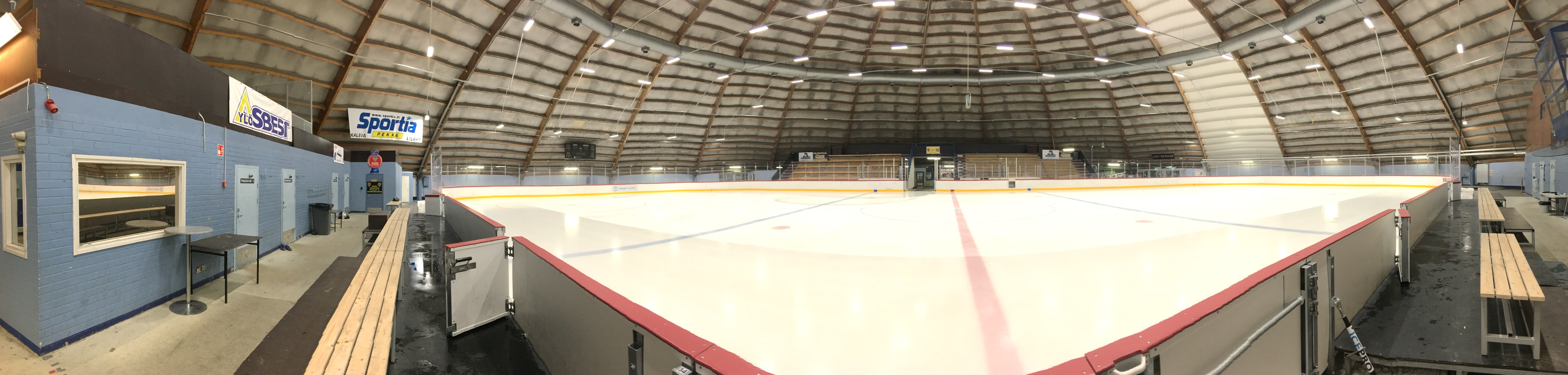 Tampereen harjoitusjäähallissa (Hakametsä 2) otettu panoraamakuva 29. lokakuuta 2016.